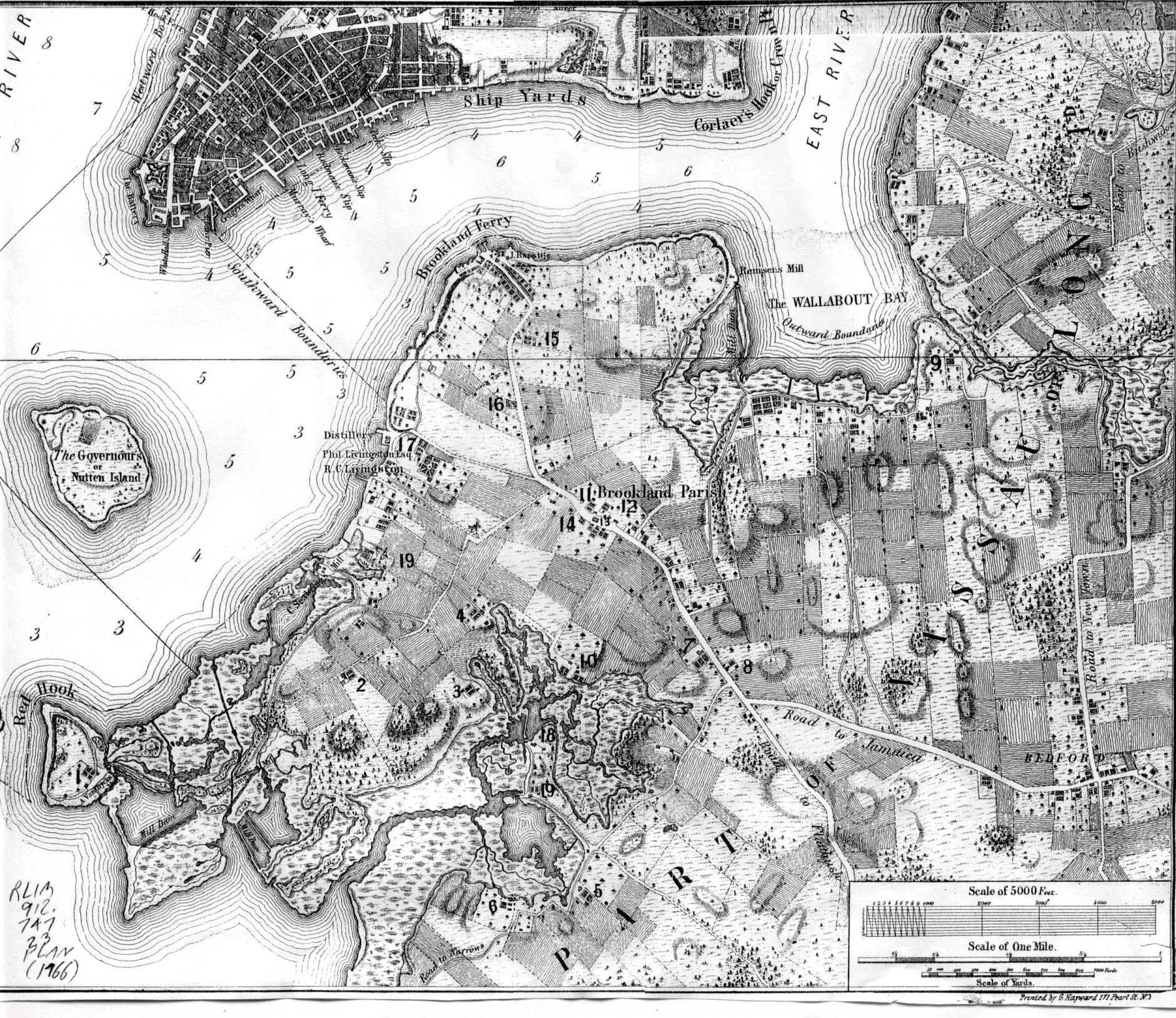 Map of Brooklyn, NY made in 1766